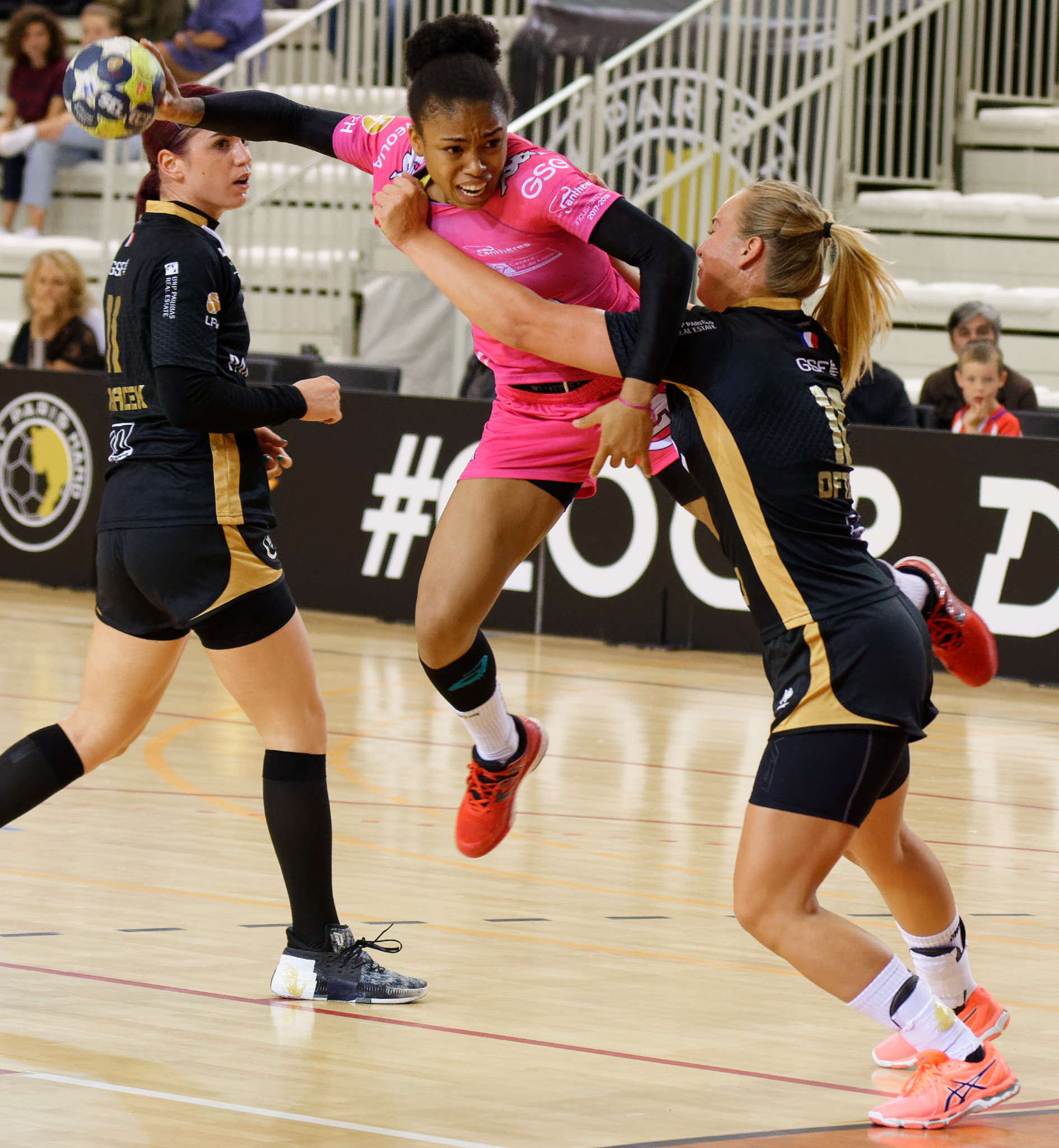 Bruna de Paula lors de la rencontre Issy Paris / Fleury. Le 03 septembre 2017 à Issy Les Moulineaux.